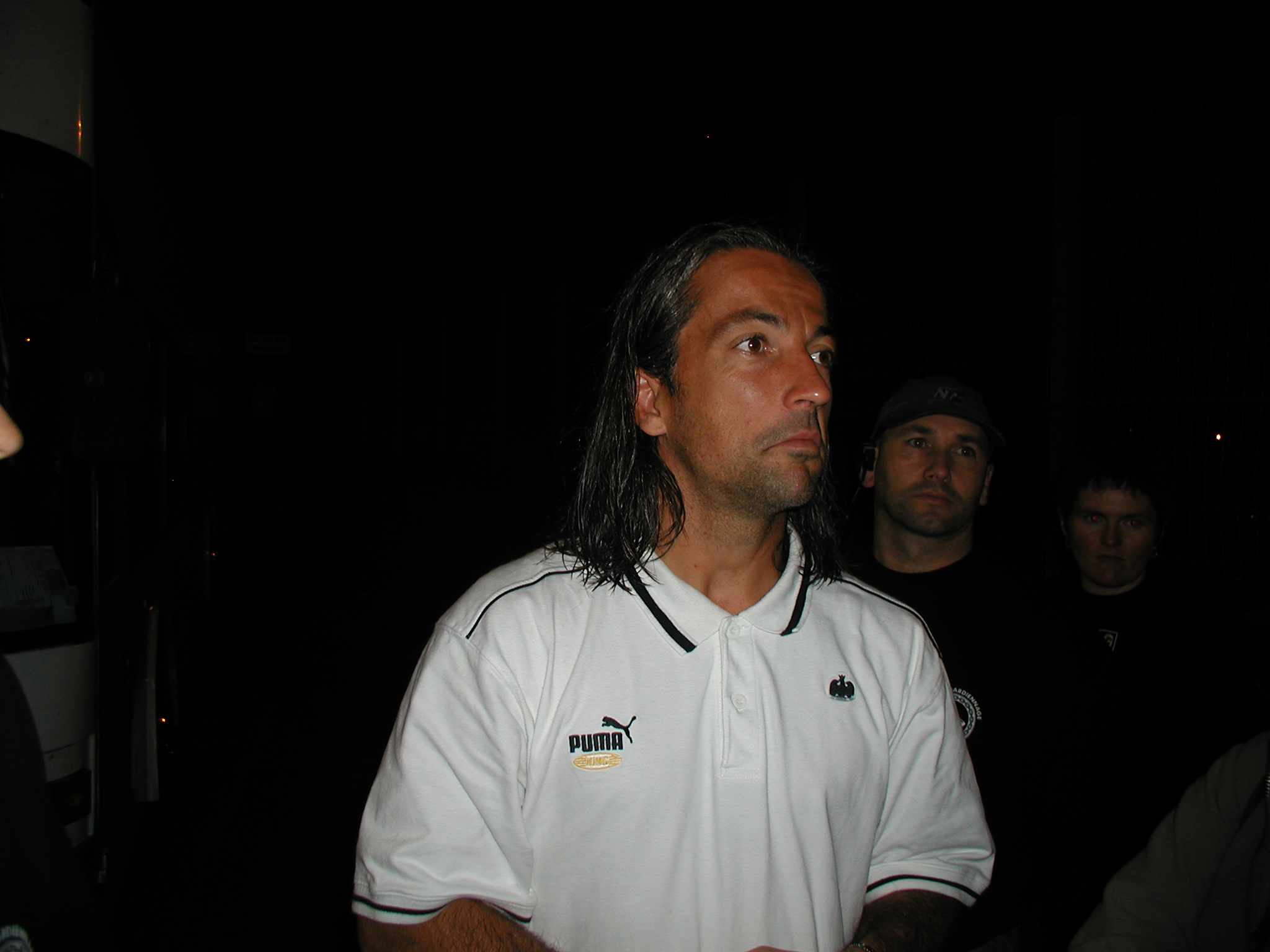 Bruno Valencony en 2002 sous les couleurs de l'O.G.C.Nice